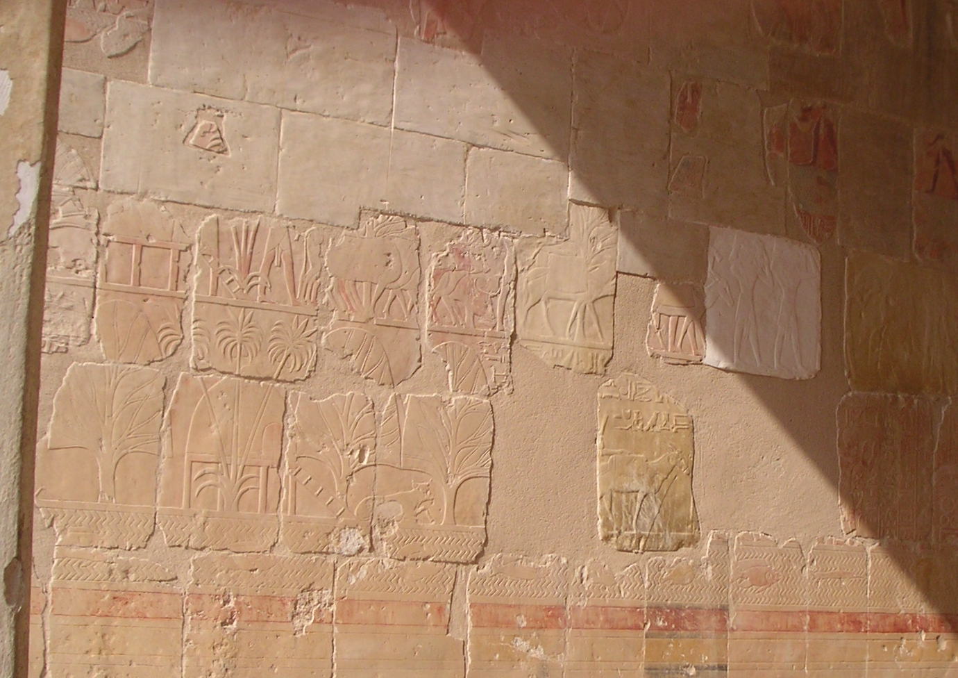 Relief représentant l'arrivée de l'expédition égyptienne au pays de Pount ; partie représentant le village - Temple d'Hatchepsout à Deir el-Bahari - XVIIIe dynastie égyptienne